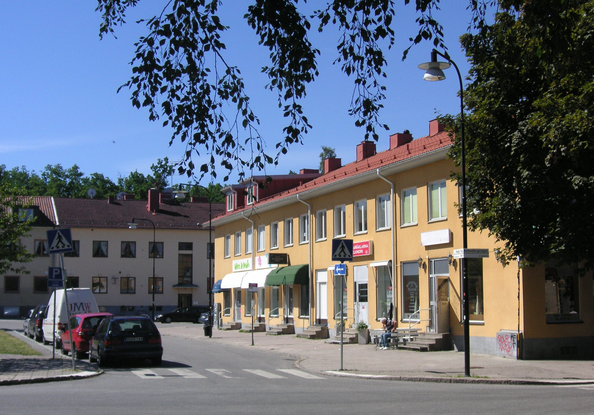 Ängby torg i Norra Ängby, Bromma/Stockholm